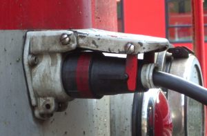 Stecker eines Verbindungskabels nach UIC 568 im österreichischen Kleinreifling.